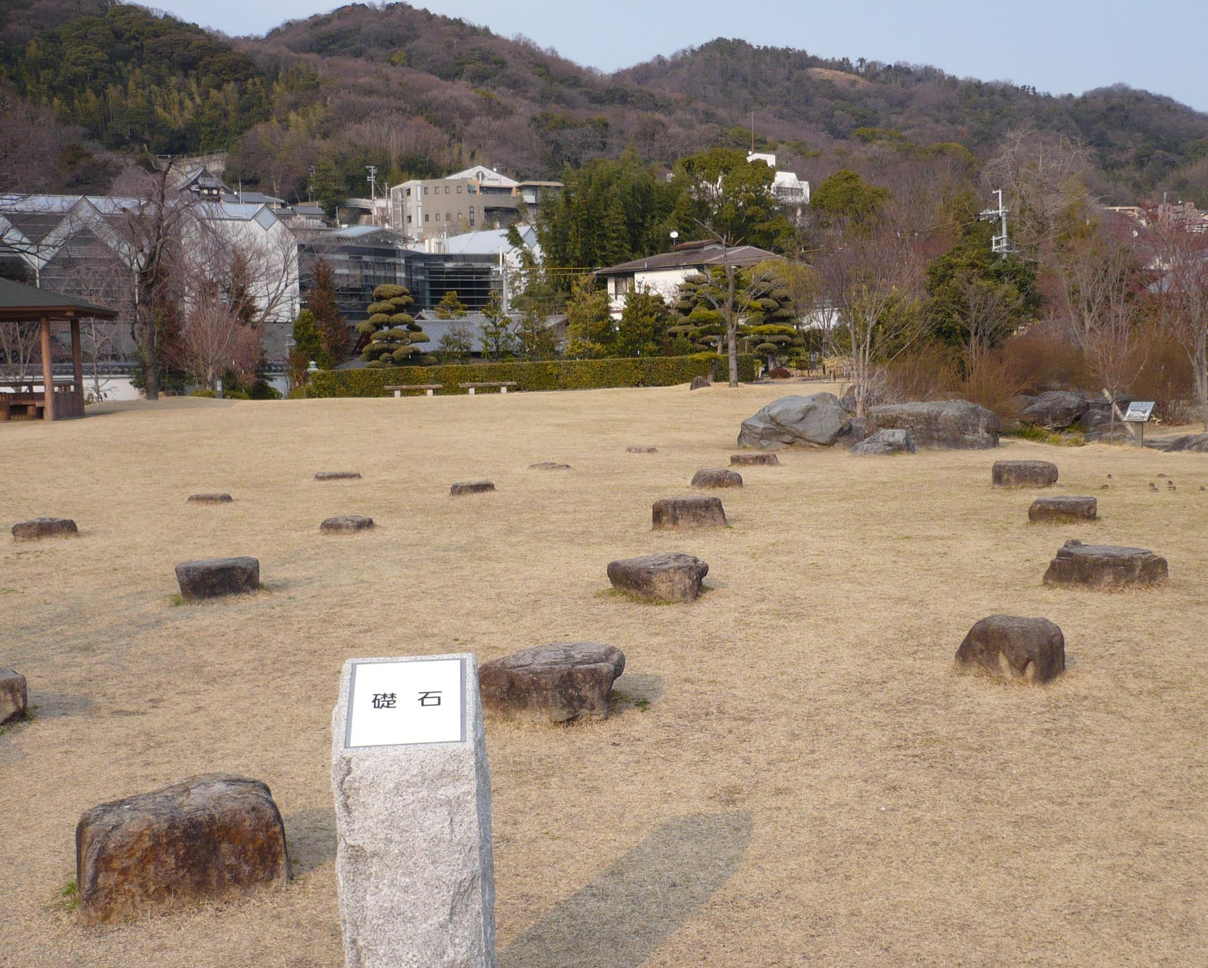 池田城の礎石跡